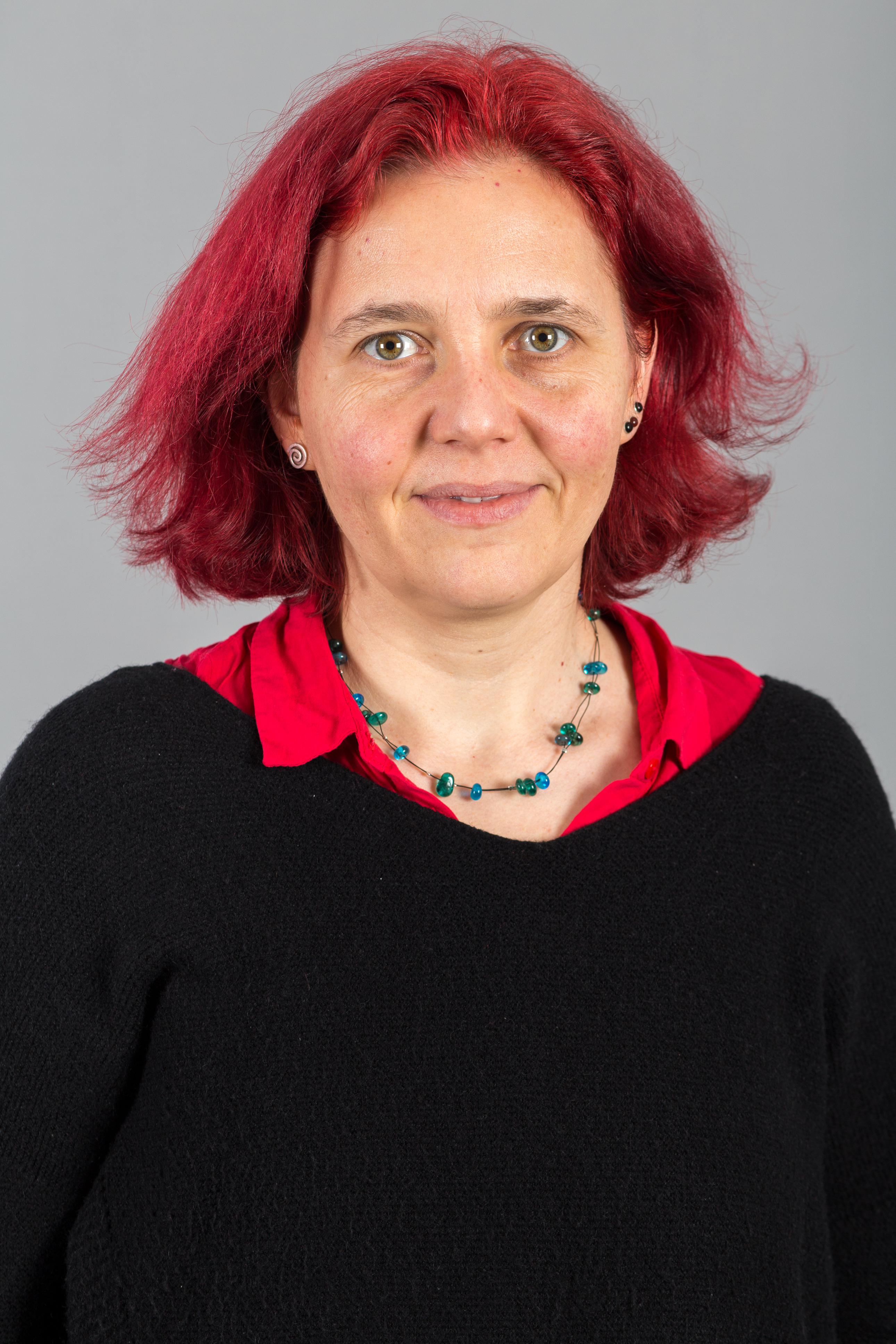 Astrid Rothe-Beinlich